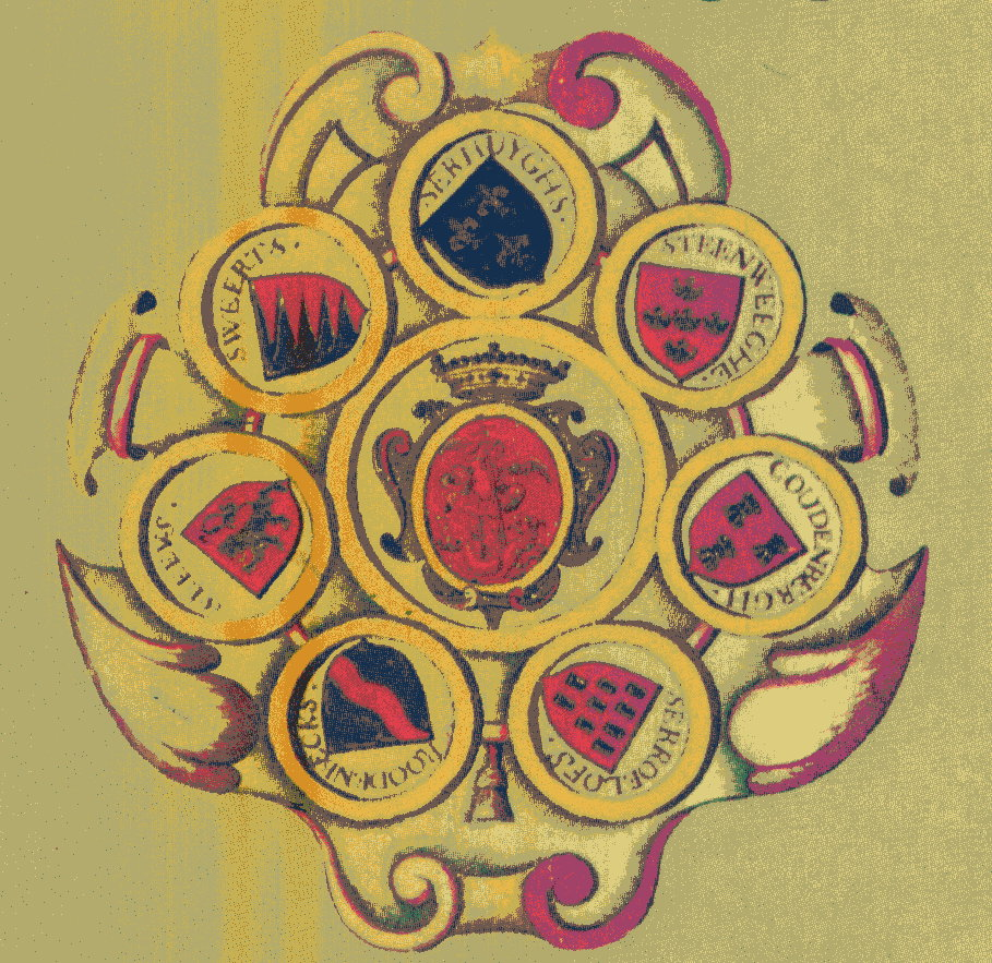 Blasons des Lignages de Bruxelles aquarelle